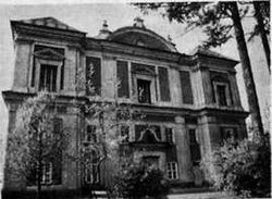 Połonne - kościół rzymskokatolicki pw. św. Anny